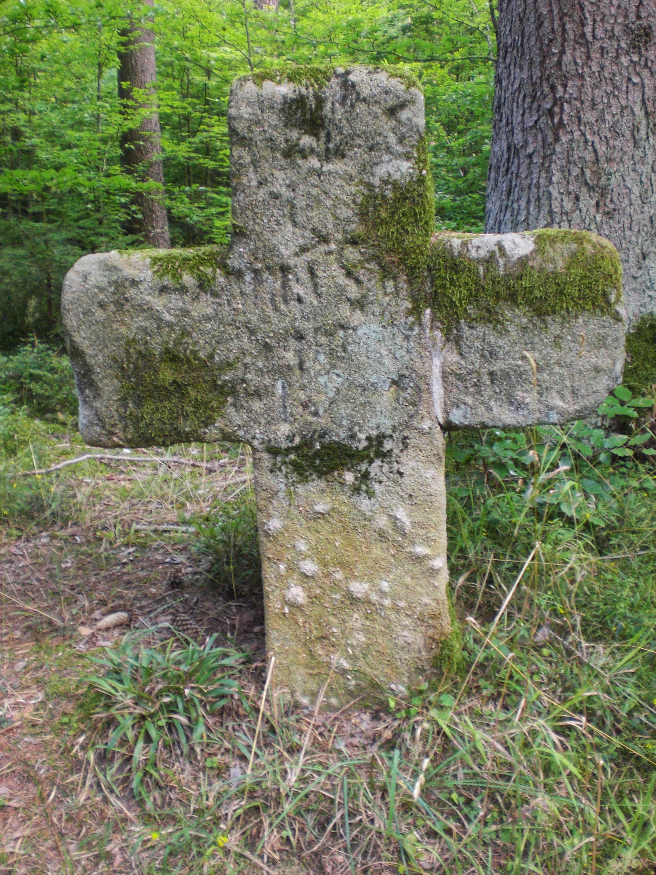 Steinkreuz nahe Fischbach, Richtung Netzstall